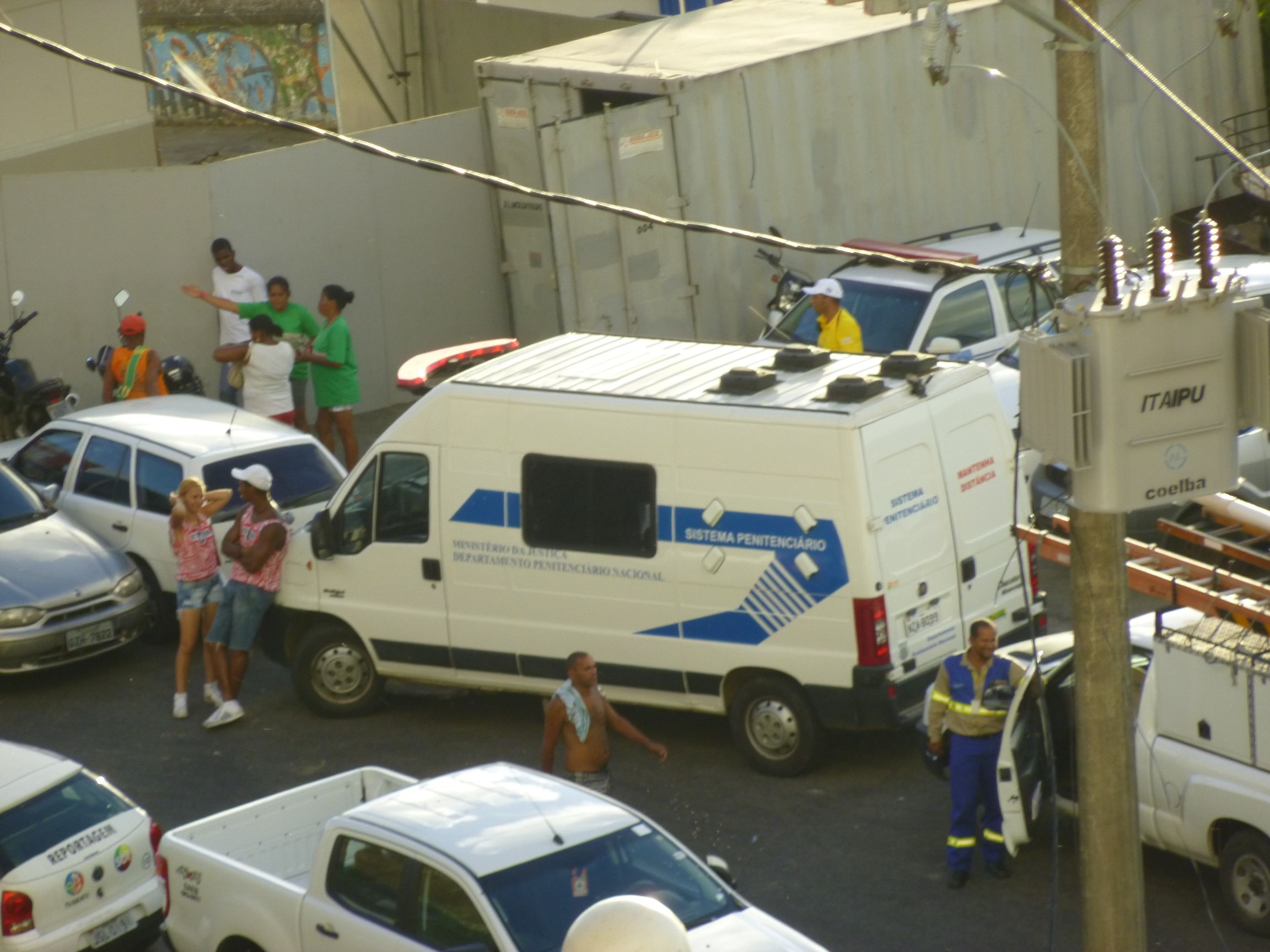 Gefangenensammelstelle Salvador Bahia Karneval 2013